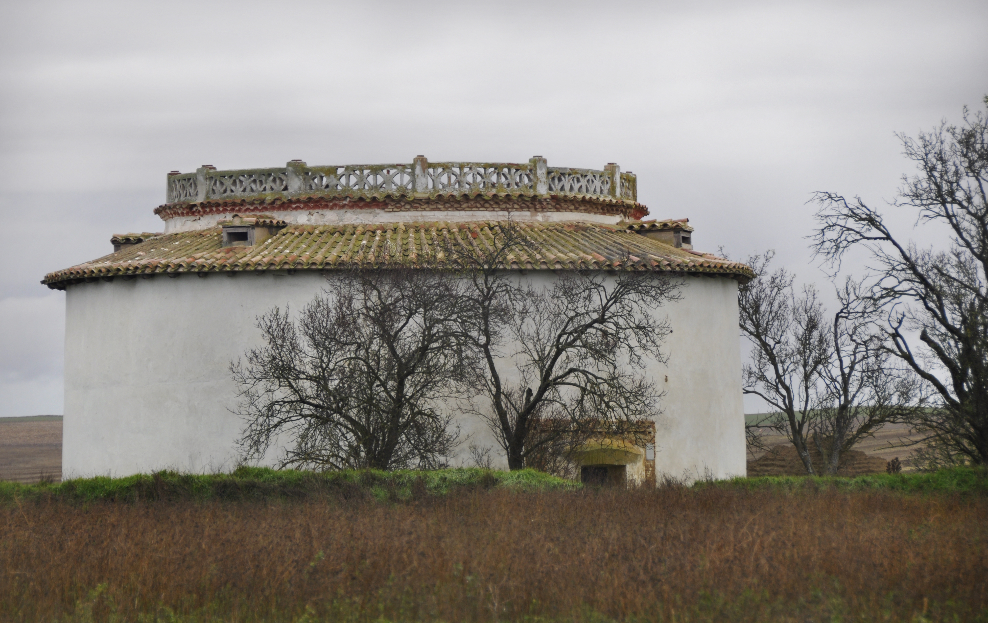 palomar